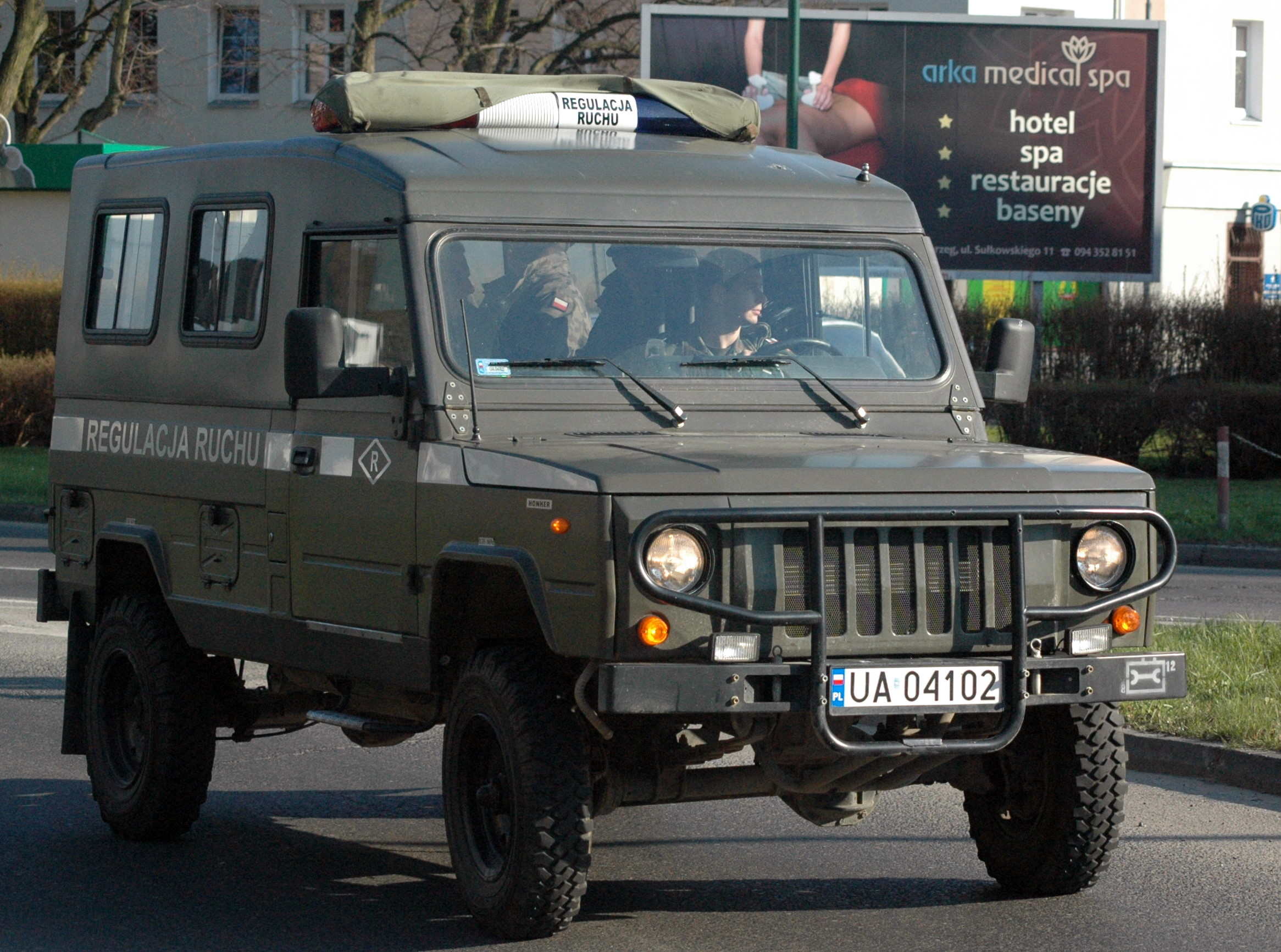 Honker w Kołobrzegu.